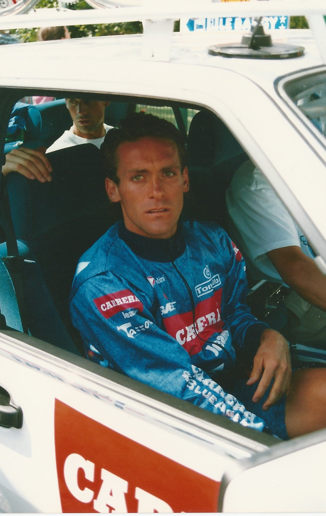 Mario Chiesa voor het vertrek naar een Tour etappe